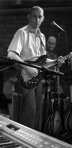 Jakobus Siebels bei einem JaKönigJa-Konzert in Köln 2005. Hinter ihm sitzt Bandmitglied Marco Dreckkötter.